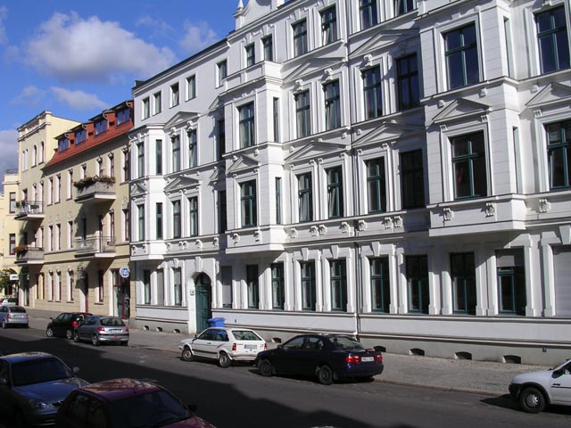 Magdeburg, Stadtfeld-Ost, Häuser in der Arndtstraße